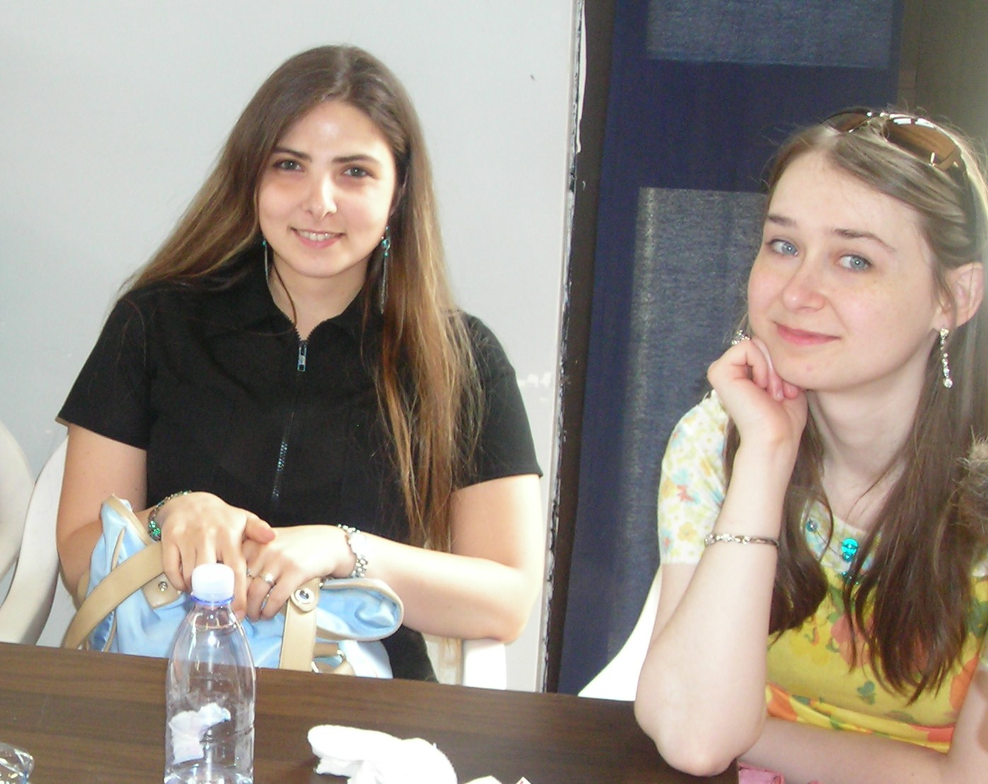 Le Peruggine (Barbara Apostolico e Claudia Lombardi) al Yaoi Cosplay Contest 2008 - Perugia